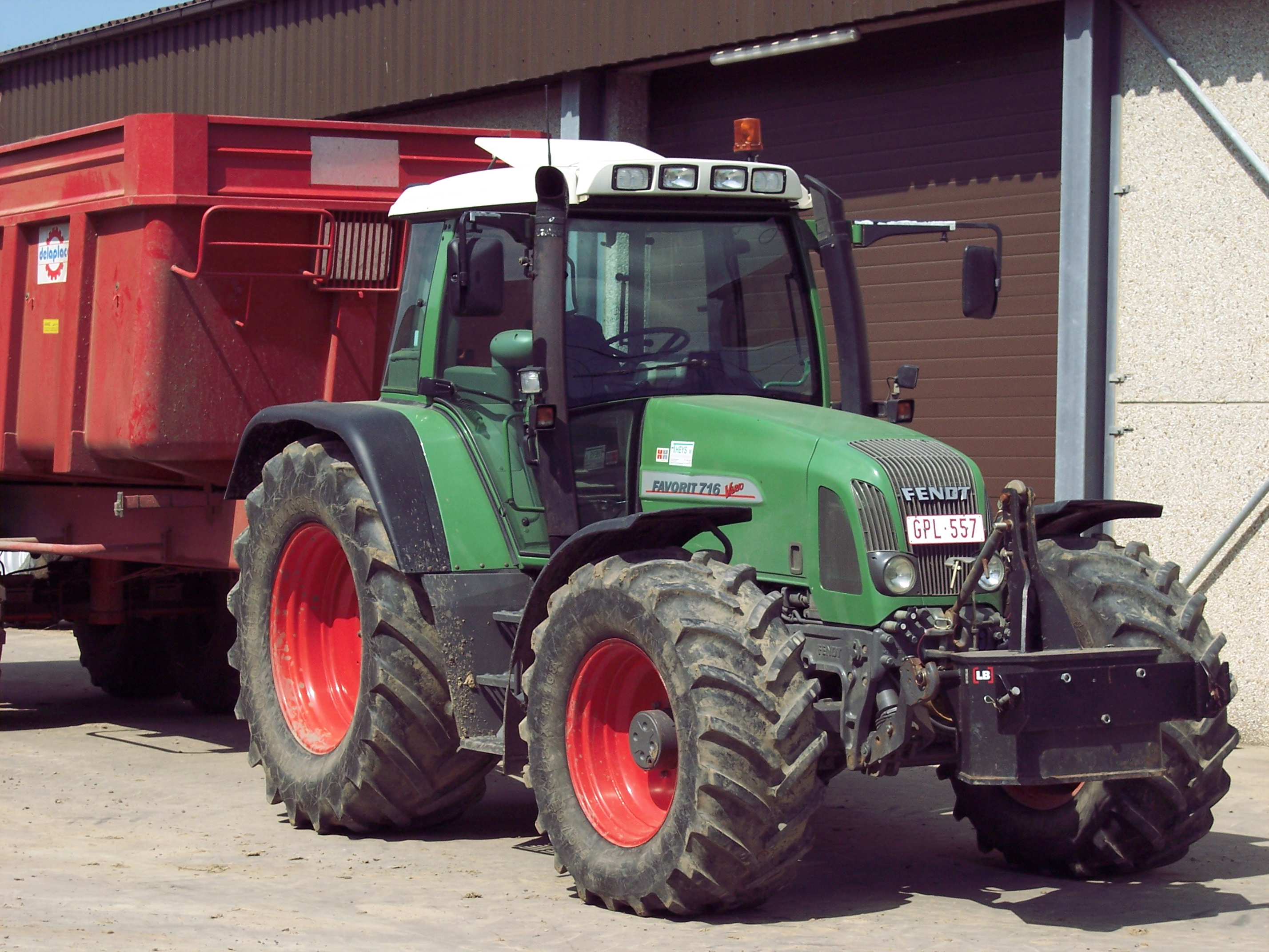 Fendt Favorit 716 Vario puissance de 160 cv 6 cylindres vitesse de 50 km/h atteinte à un faible régime